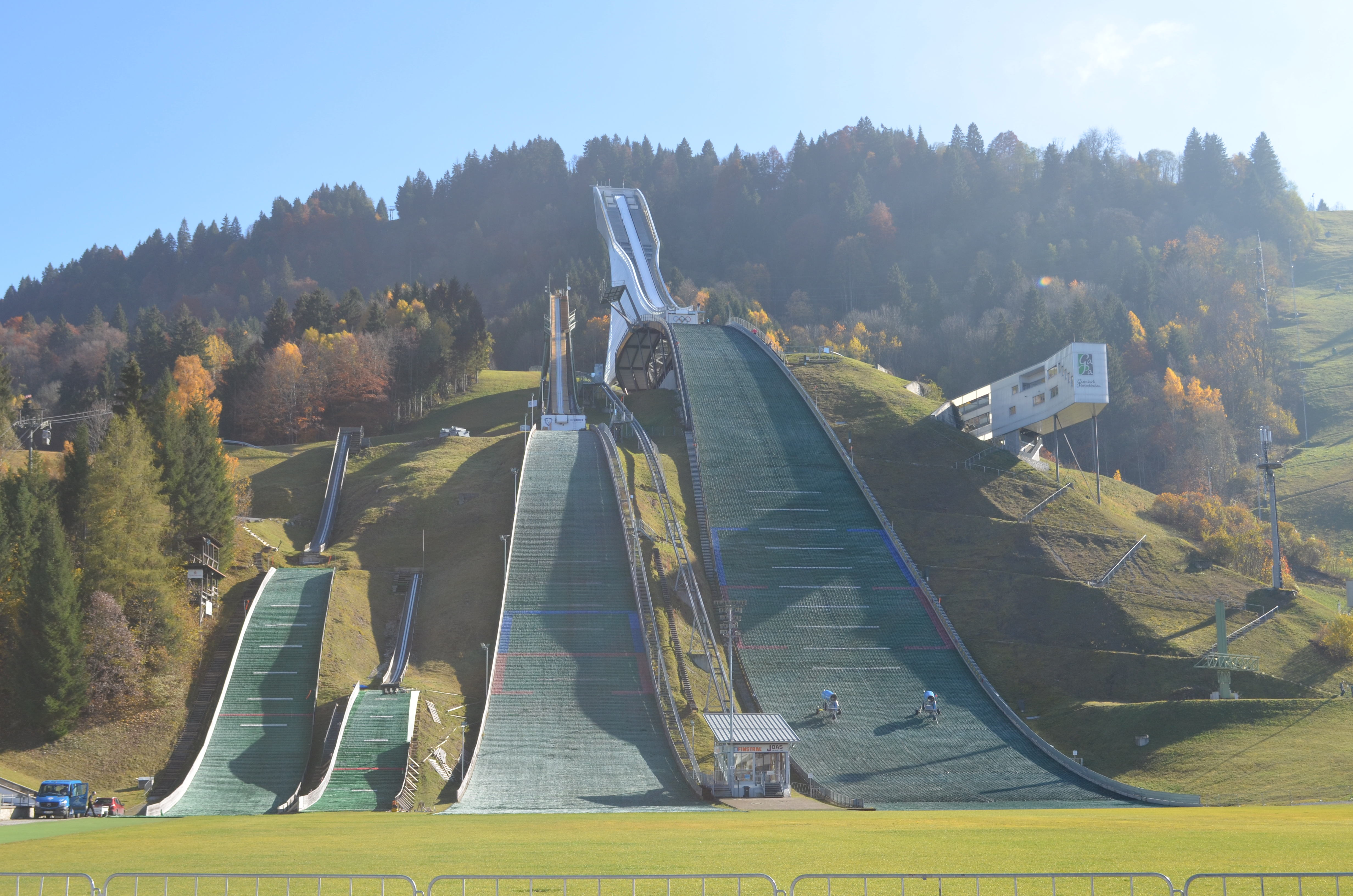 Olimpiaschanze